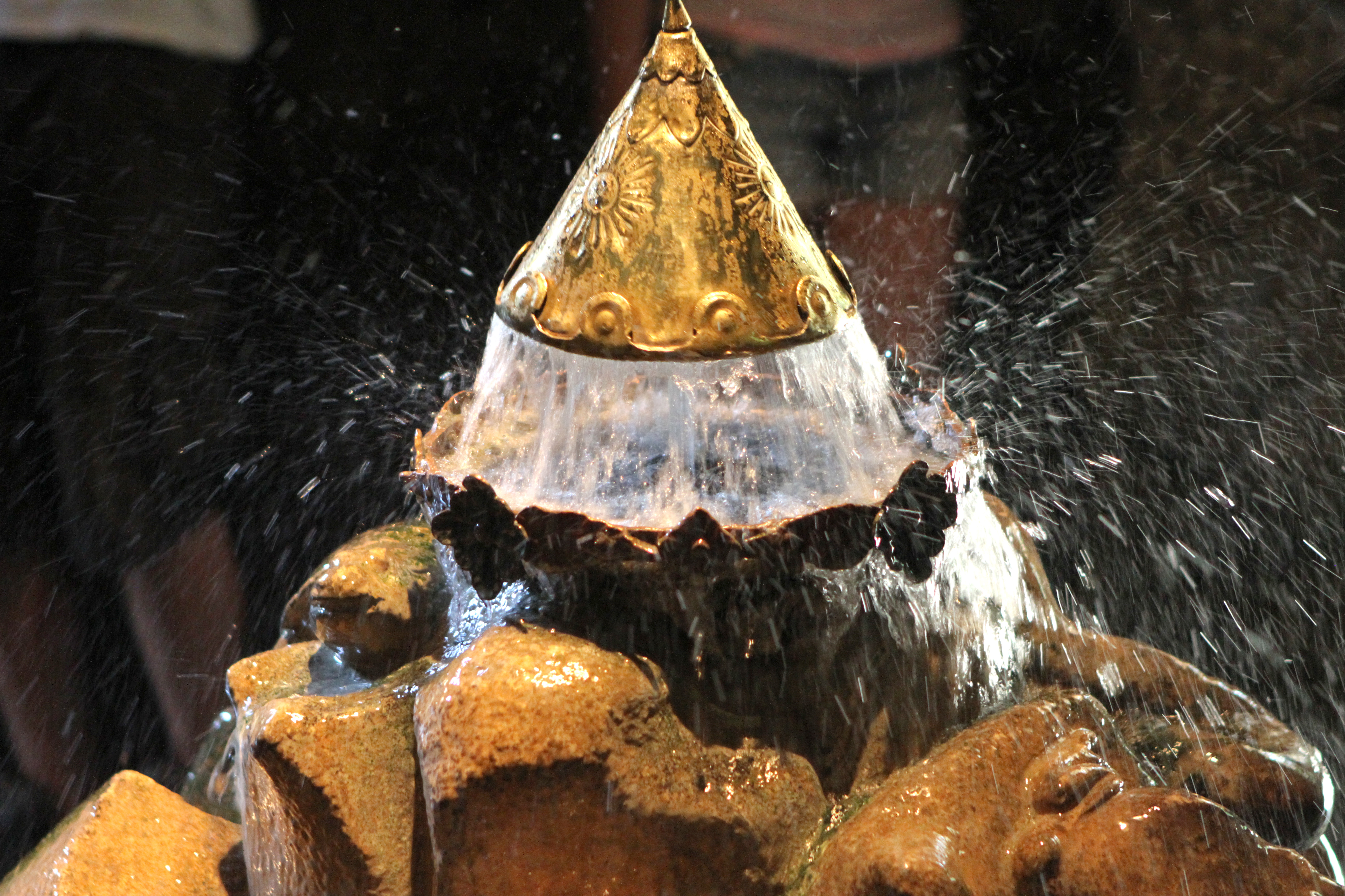 Schlossanlage Hellbrunn, Gesamtanlage samt Gartenbaudenkmalen